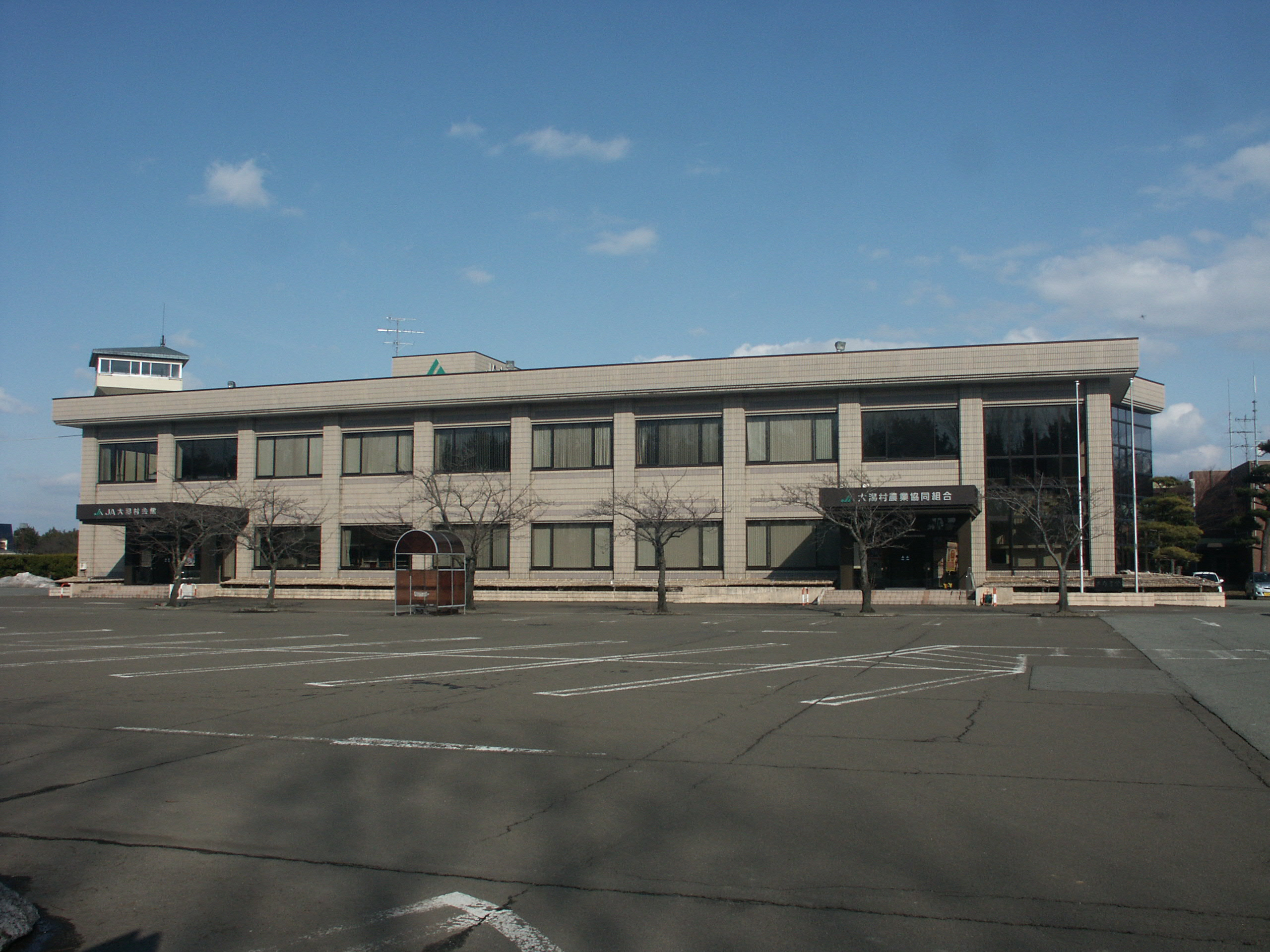 大潟村農業協同組合 本店